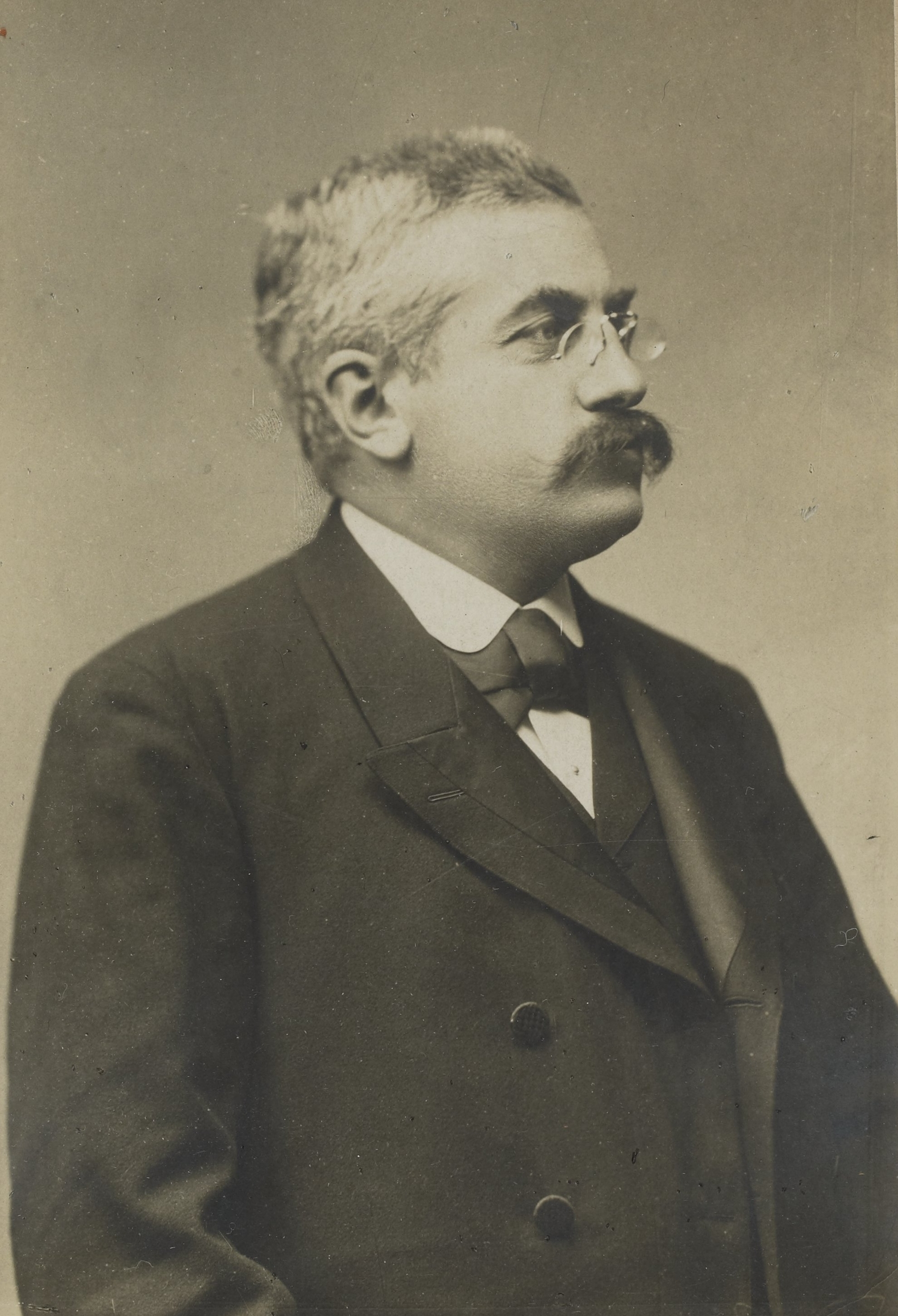 Exposition universelle de 1900 : portrait de Alexandre Millerand.